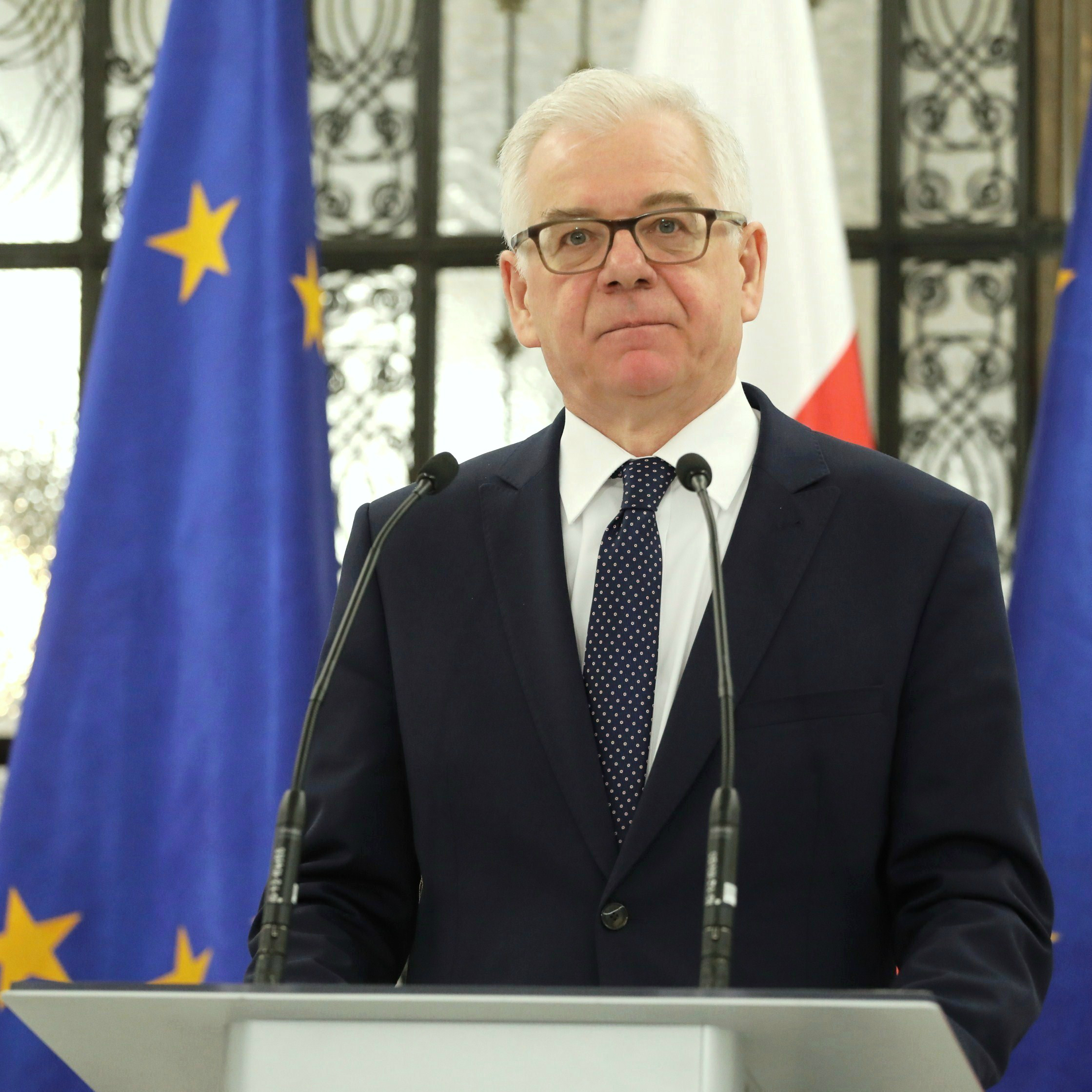 Prof. Jacek Czaputowicz, politolog i urzędnik państwowy.